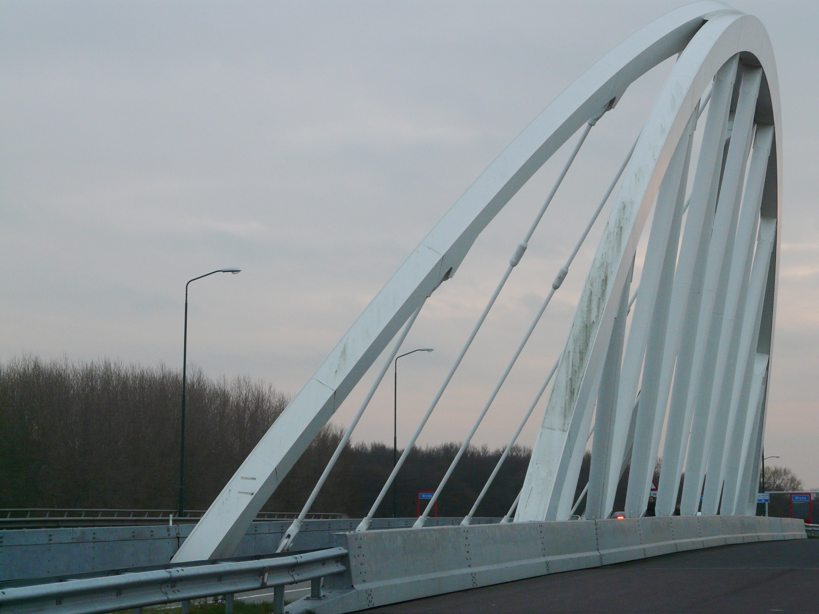 Brug over de rivier de Mark tussen Terheijden en Breda